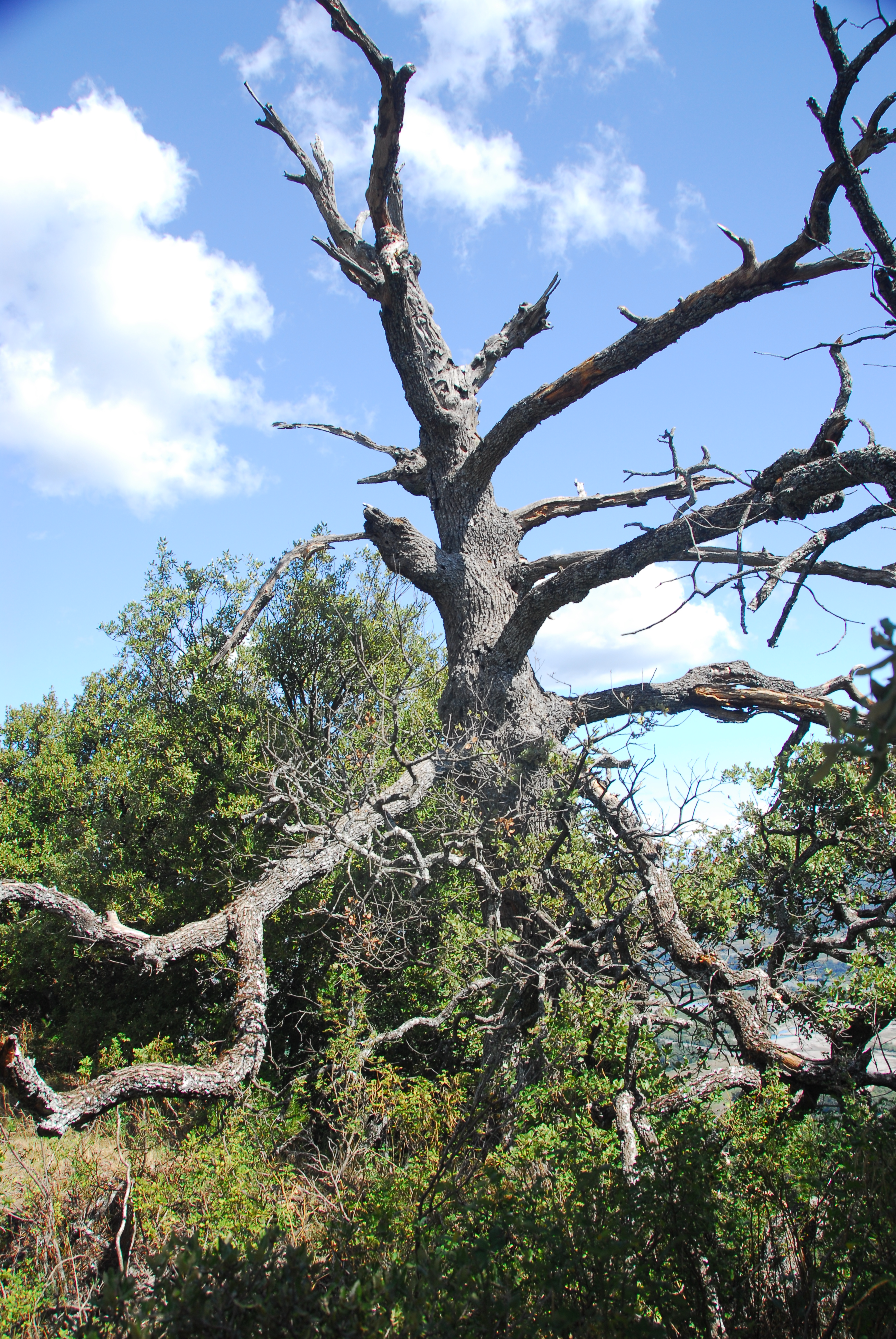 Prieuré de Ganagobie, Verdorrtes Astwerk